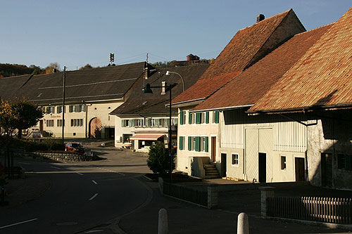 Häuserzeile in Seewen (SO)